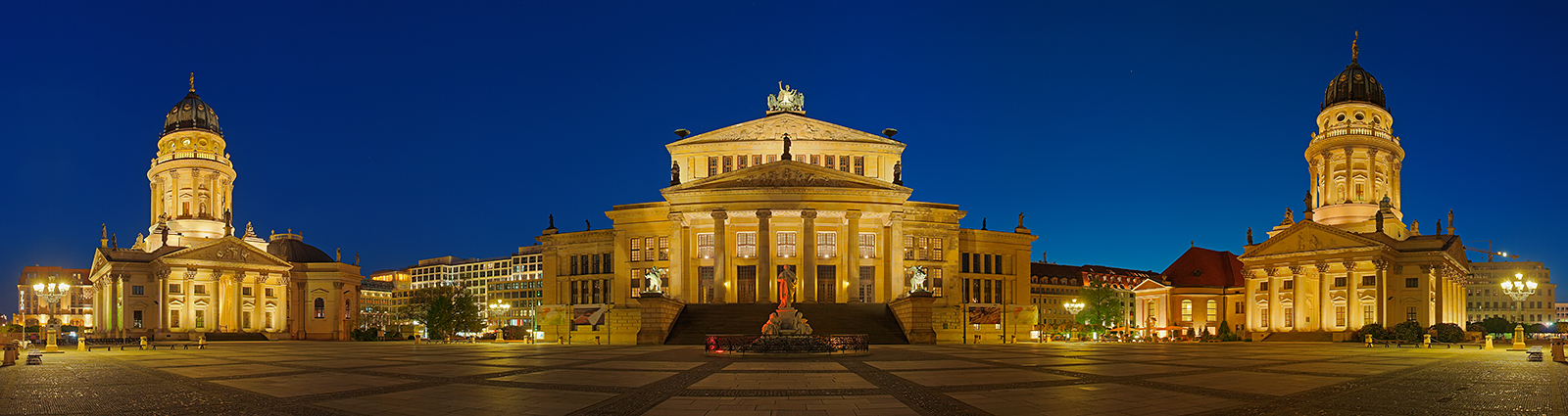 Panorama vom Gendarmenmarkt Berlin 2008